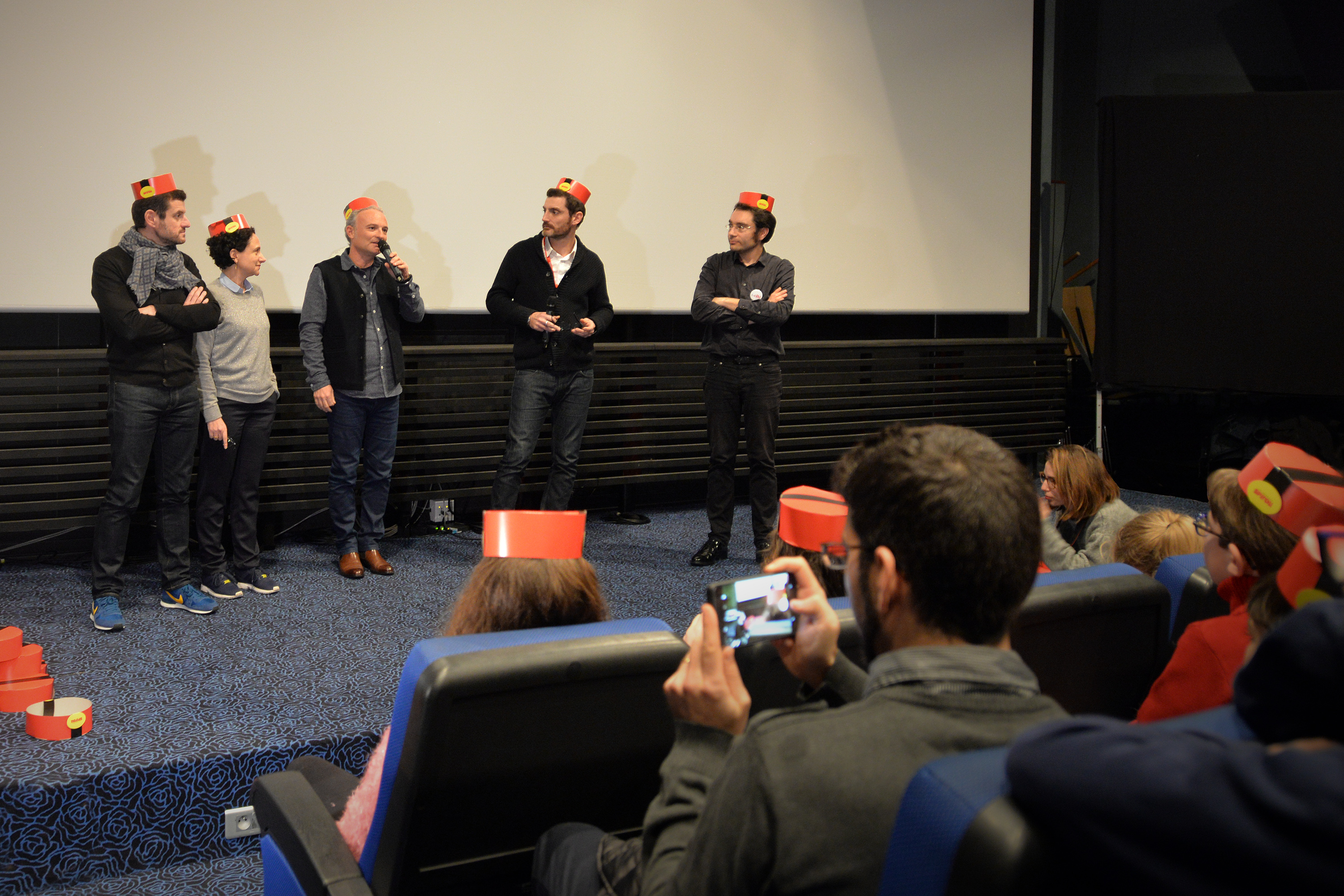 Fabien Suarez et Juliette Sales, les deux scénaristes, avec le producteur Marc Missonnier et le réalisateur Alexandre Coffre présentant l'avant-première de leur film Les Aventures de Spirou et Fantasio au Festival d'Angoulême 2018.